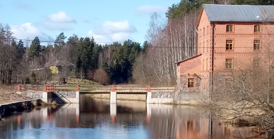 Kiidjärve vesiveski ja valminud sild, märts 2020